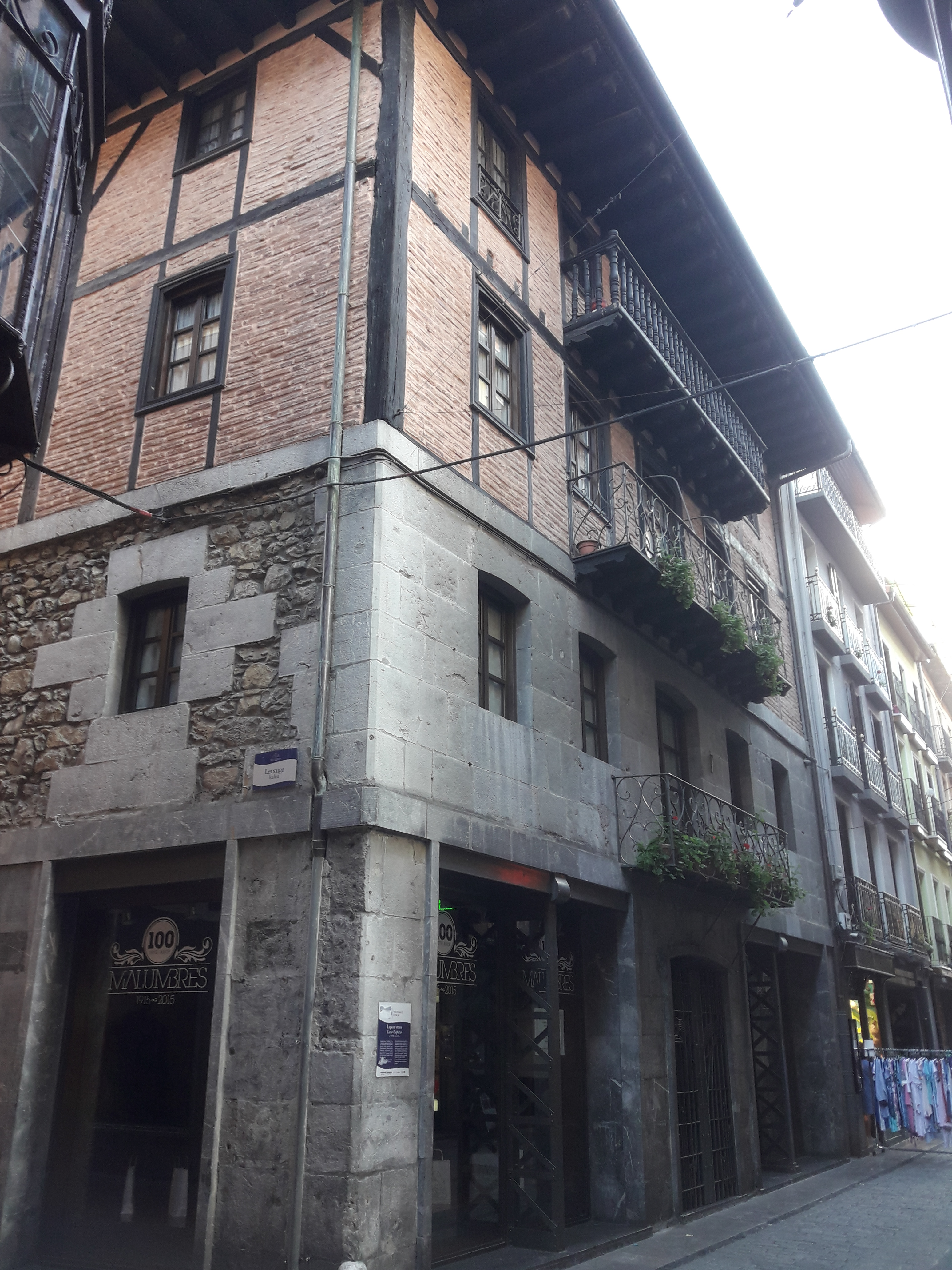 Casa Lapaza, a Tolosa. Lapaza etxea, Tolosan.